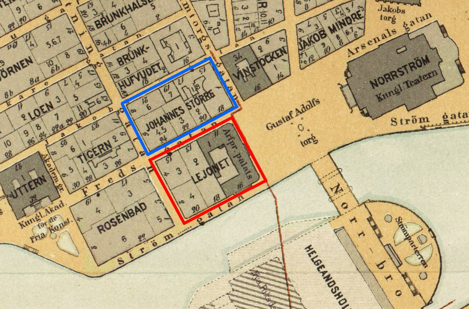 Del av Alfred Bentzers Karta öfver Stockholm, visande kvarteret Lejonet (röd), kvarteret Lejonet (blå)